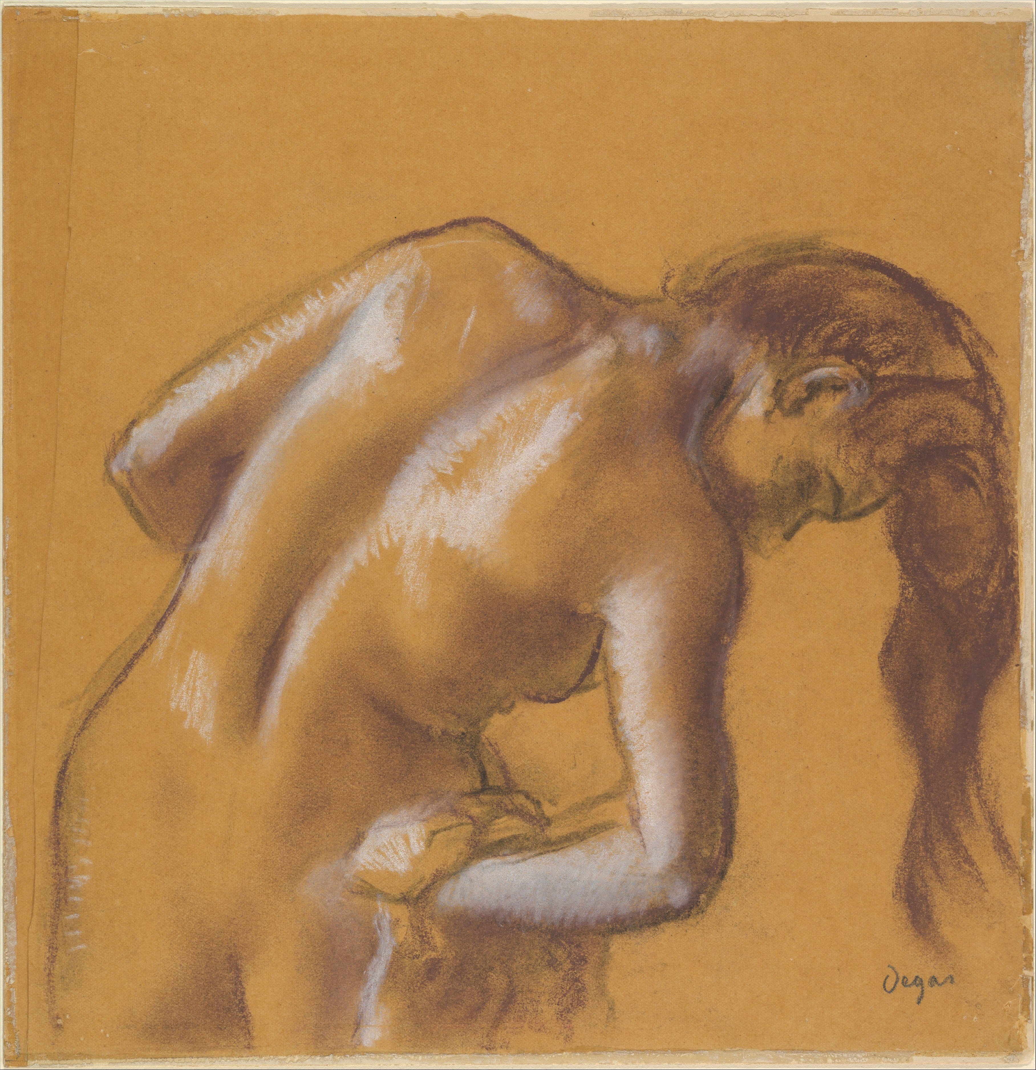 Drawing; Drawings